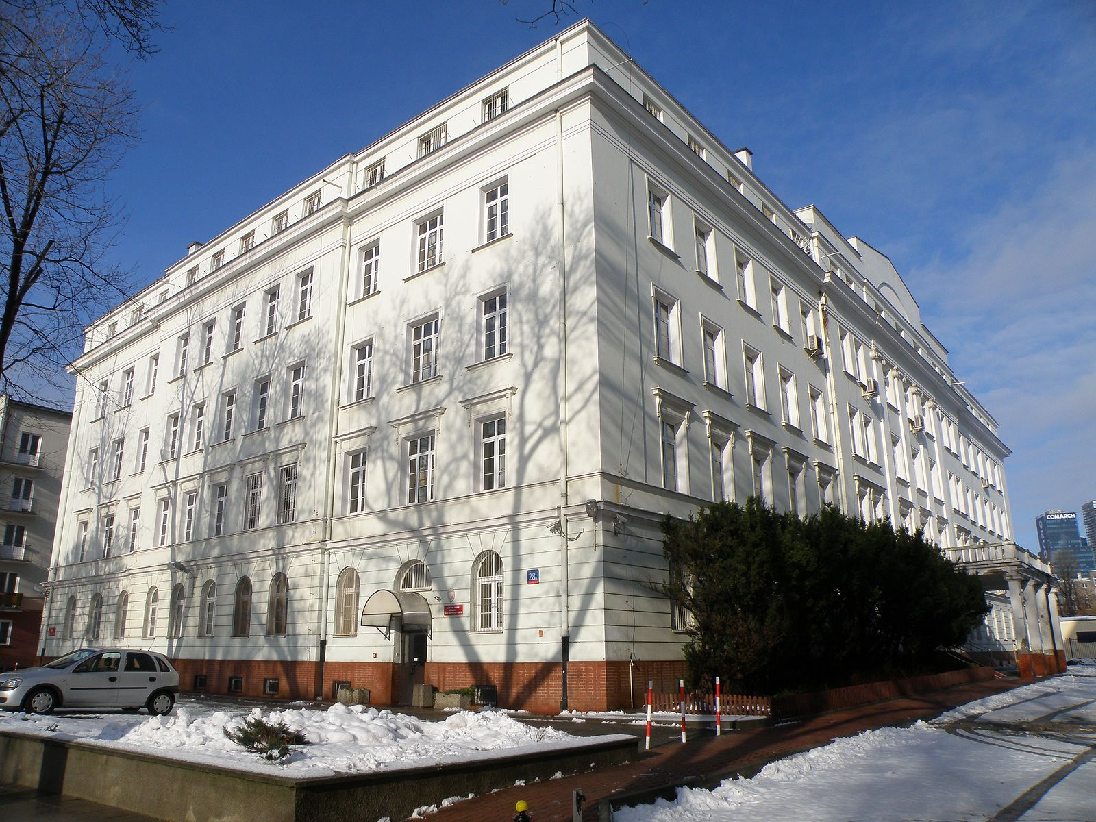 Resortowe Centrum Zarządzania Projektami Informatycznymi, dawniej Centrum Informatyki i Łączności Obrony Narodowej, Warszawa, ul. Nowowiejska 28a